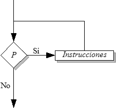 Diagrama de flujo que ejemplifica la instrucción del ciclo mientras